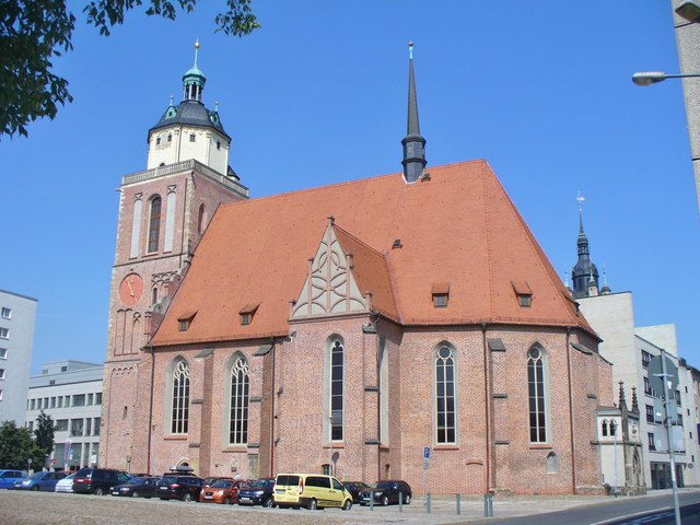 Dessau - Marienkirche (St Mary's Church)